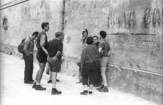 I Euskal Espeleologia Jardunaldiak (Arantzazu, 1956). Gazteen artean Grupo Espeleologico Vizcaino (GEV) taldeko kideak daude.